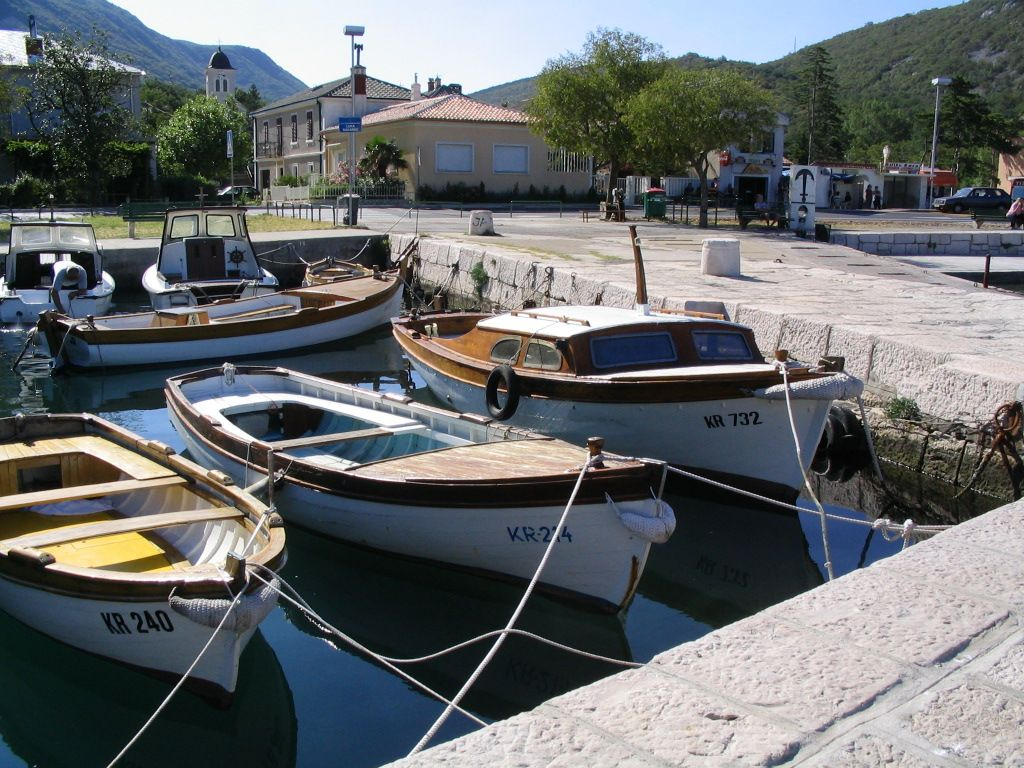 Bakarac, barke